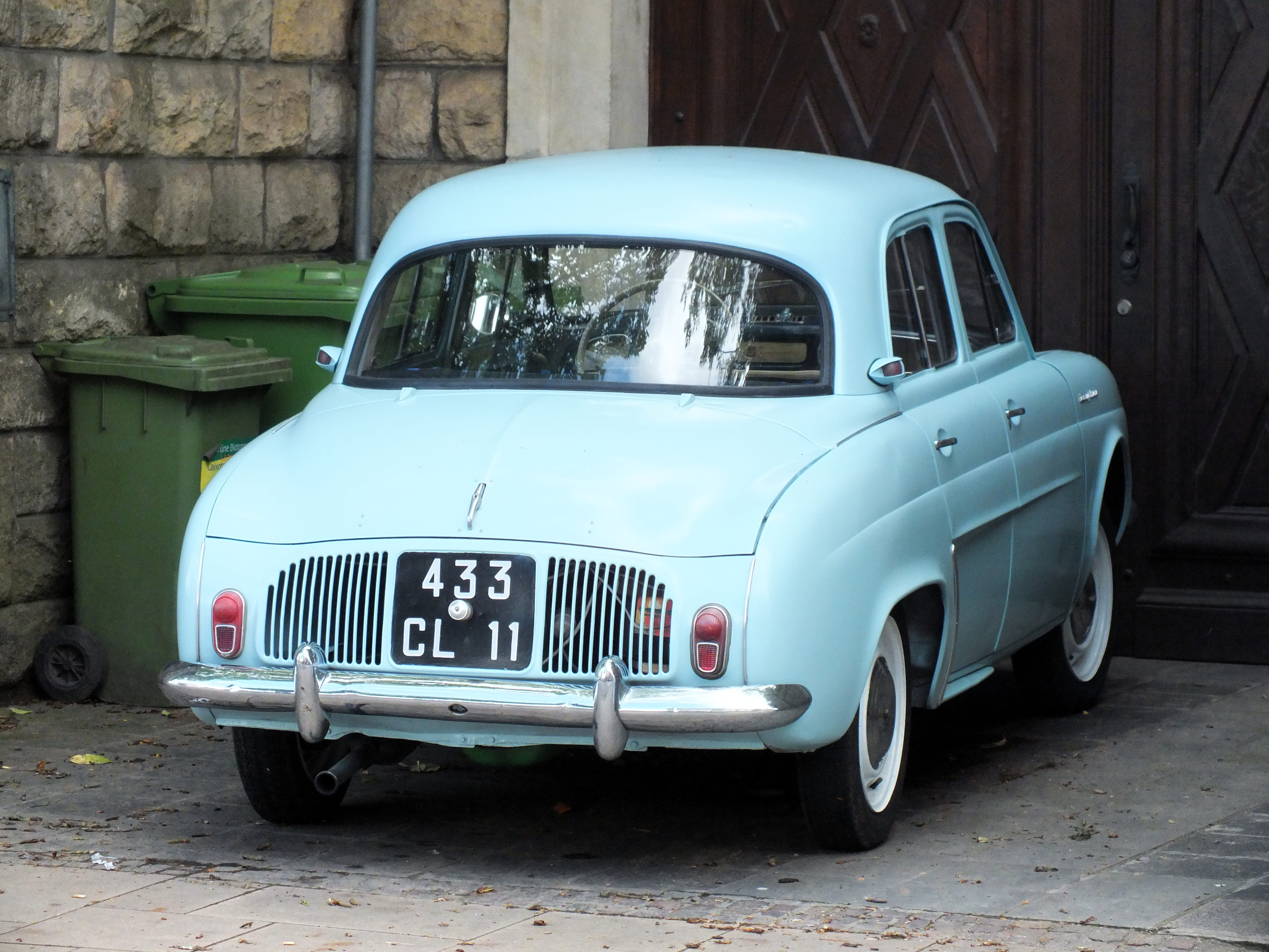 Eng Renault Dauphine zu Déifferdeng.